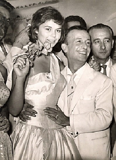 Giorgia Moll, miss cinema, con Emilio Schubert